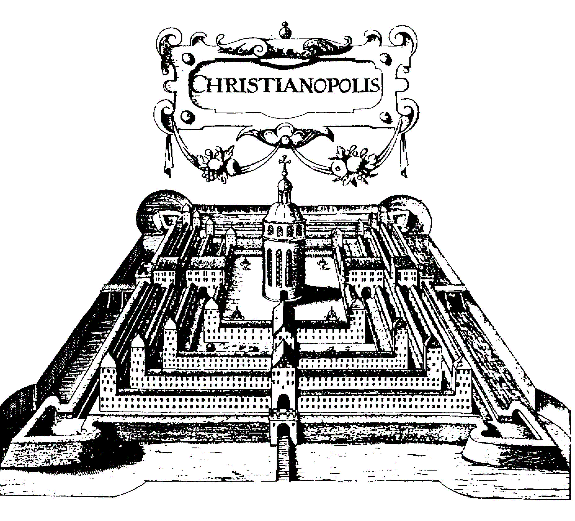 Visualisierung der Idealstadt Christianopolis aus Johann Valentin Andreaes Reipublicae Christianopolitanae descriptio. Argentorati 1619